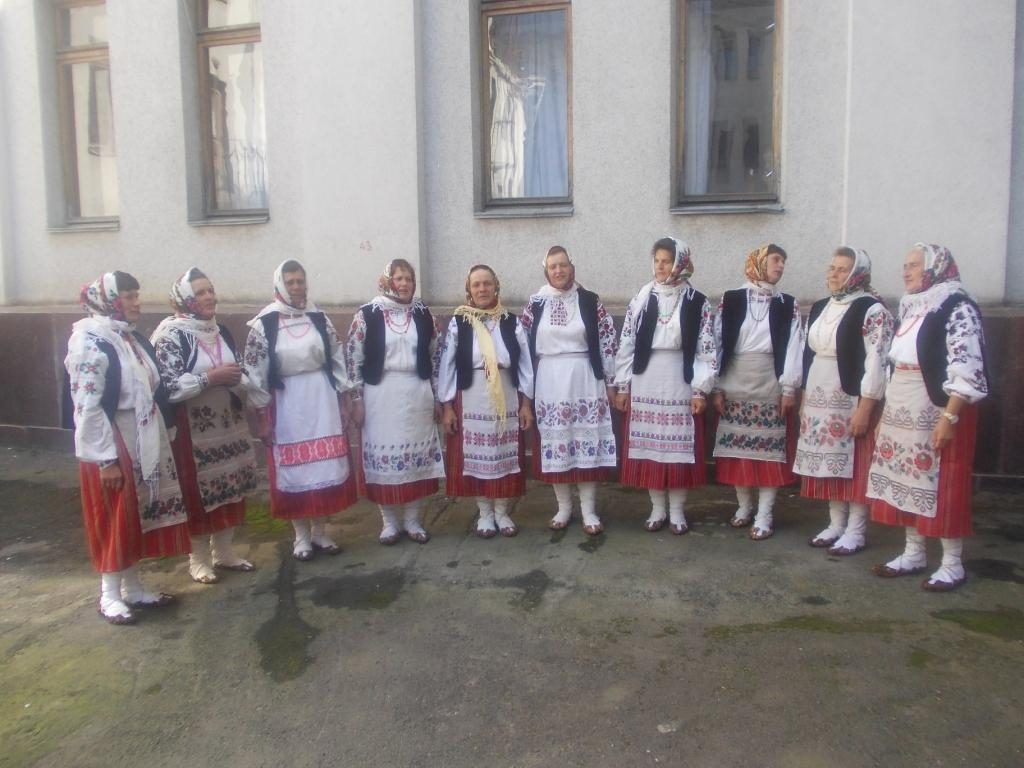 аматорсько – фольклорний колектив “Блажівчанка”